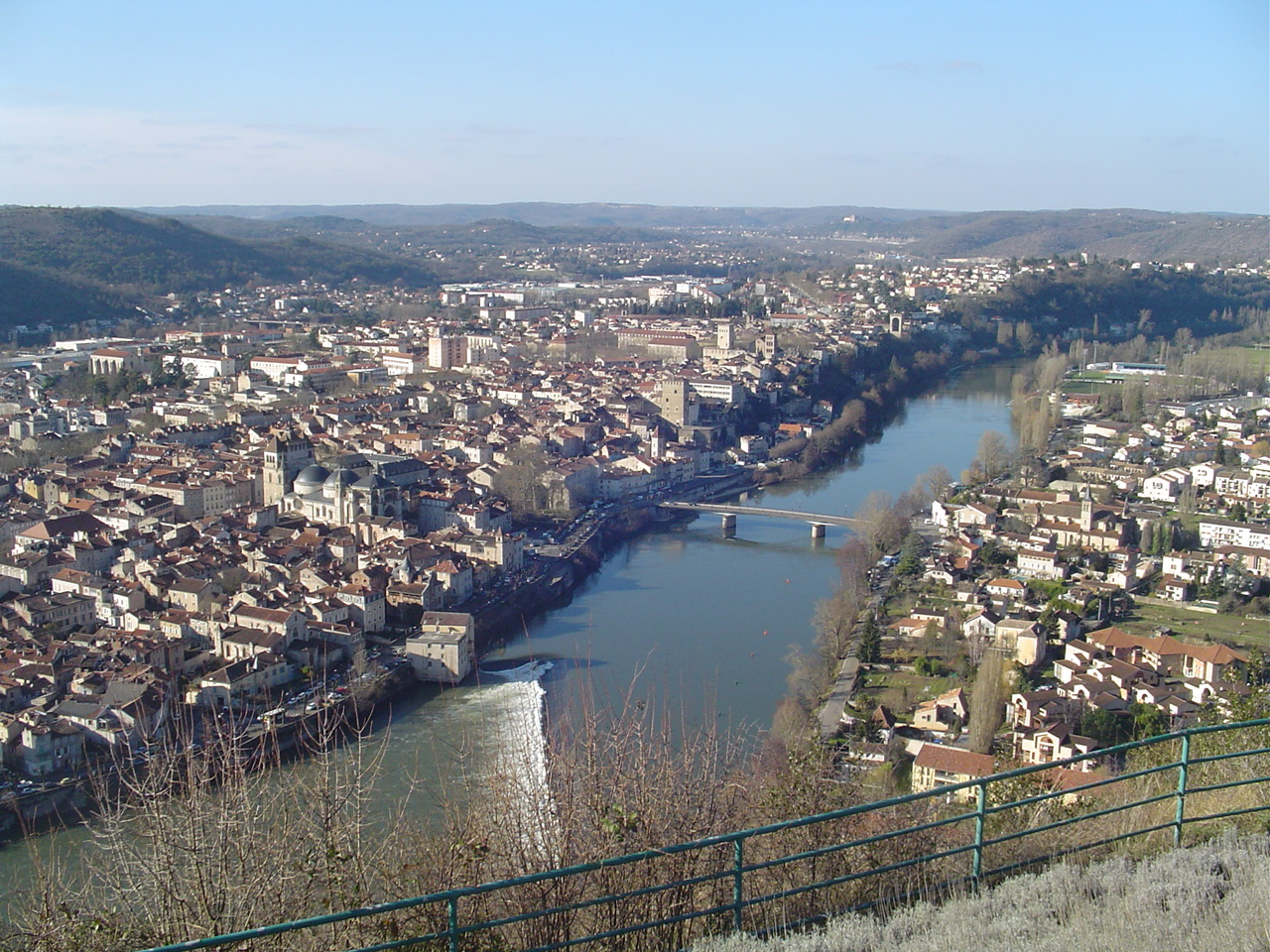 Cahors vu du Mont Saint-Cyr